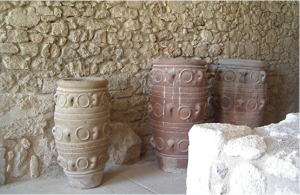 Gerres a Cnossos, foto propia